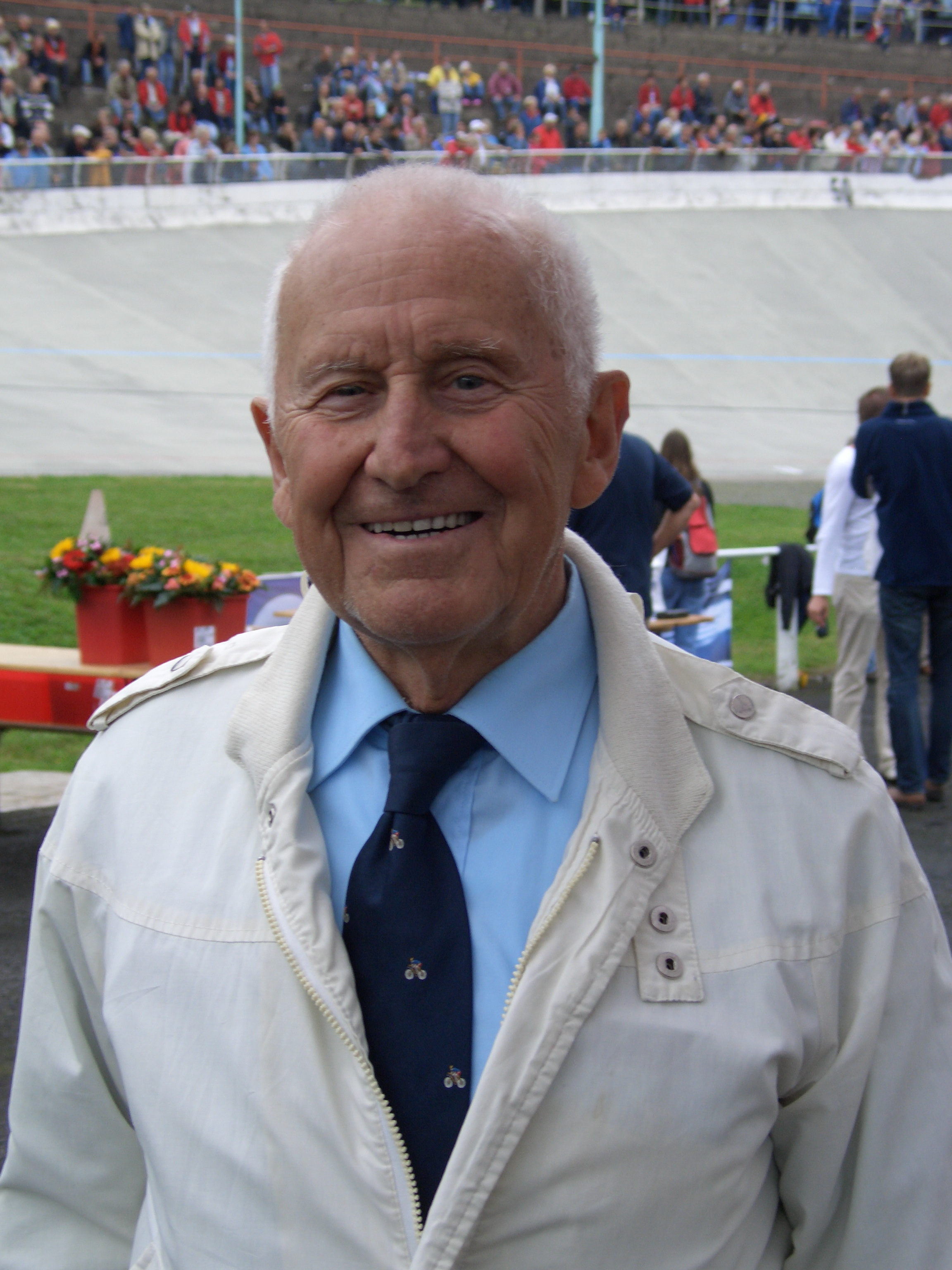 Erich Stammer, ehemaliger Radrennfahrer aus der DDR